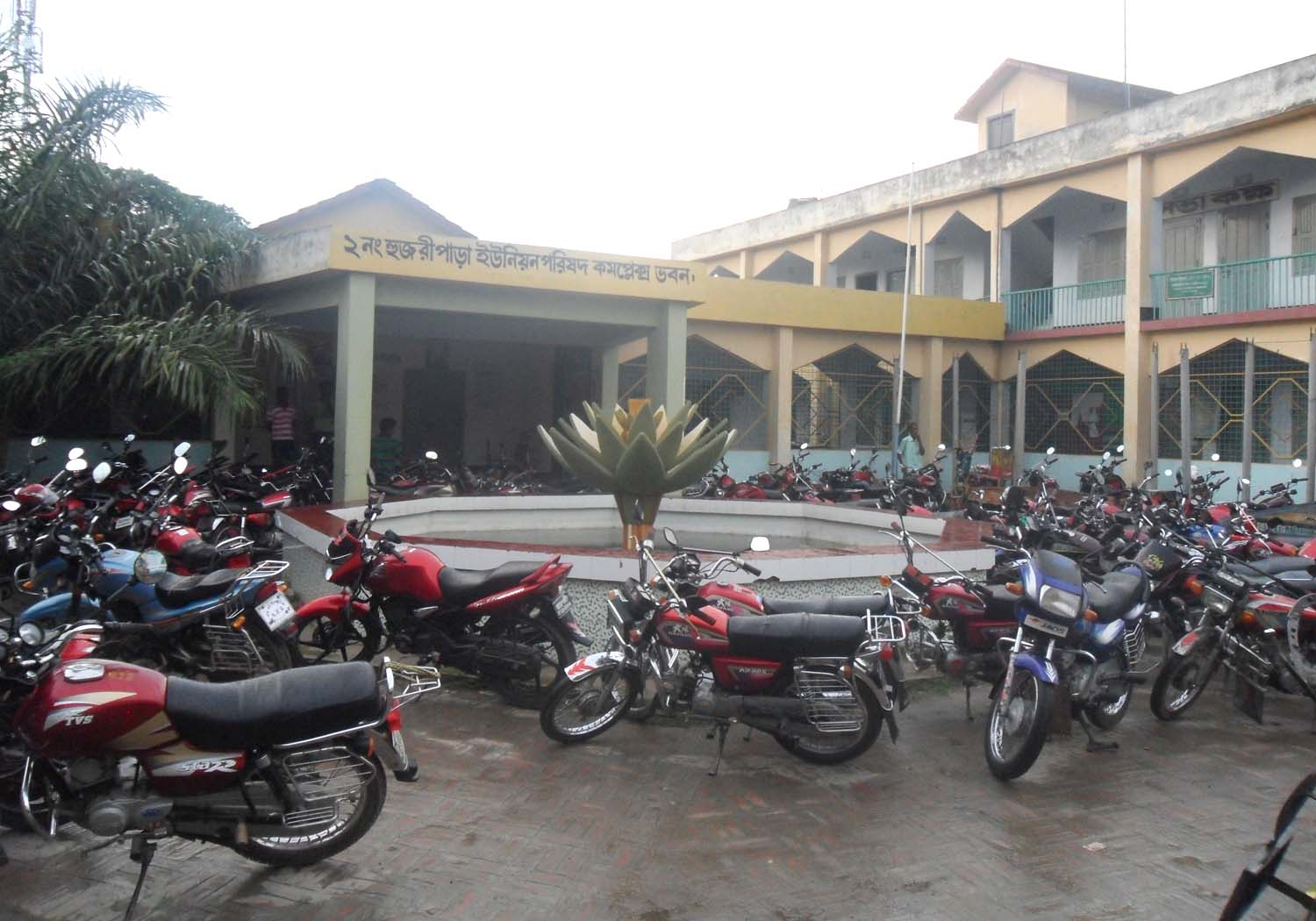 হুজুরিপাড়া ইউনিয়ন পরিষদ কার্যালয়